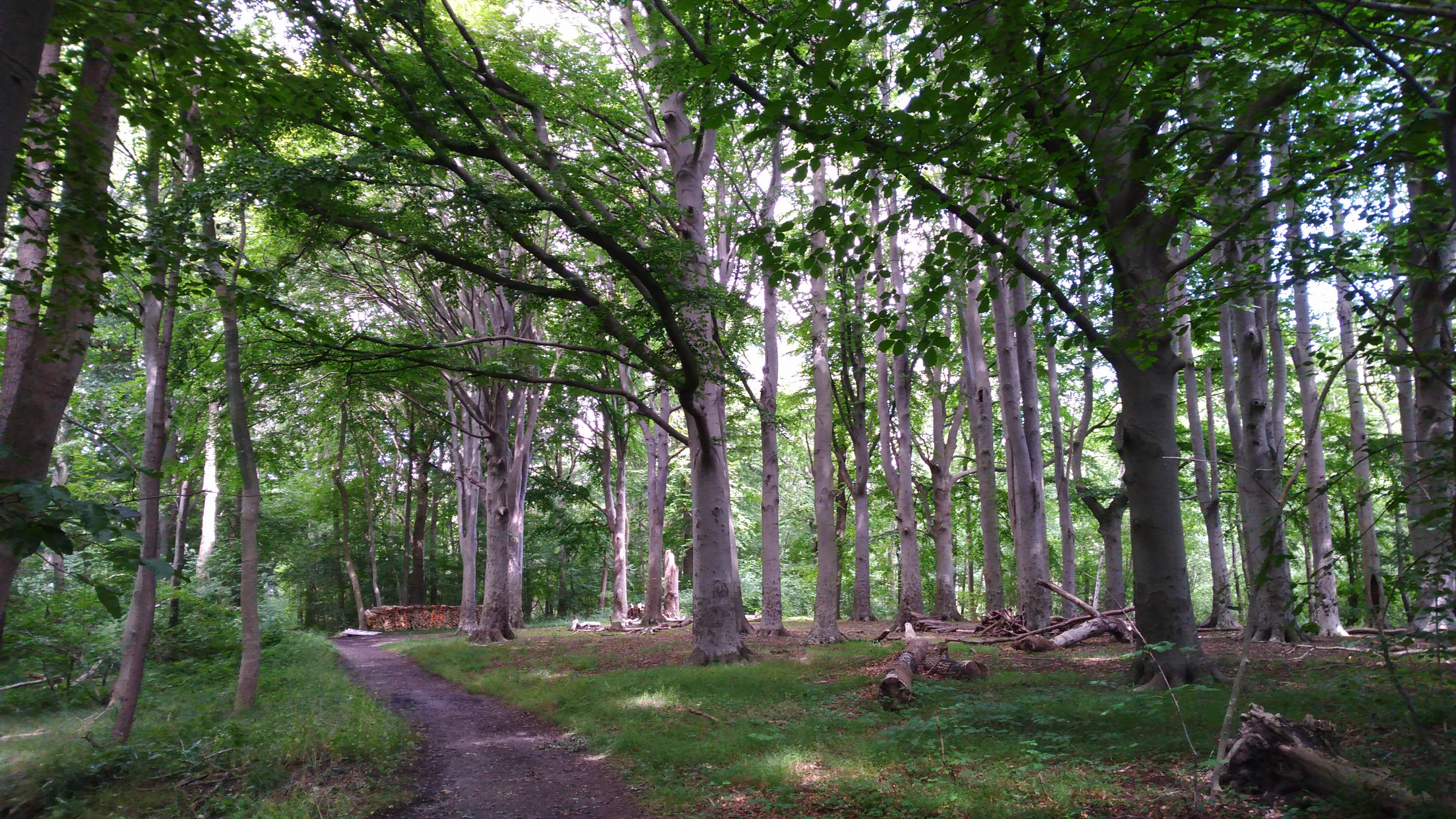 FFH-Gebiet Fehrenholz